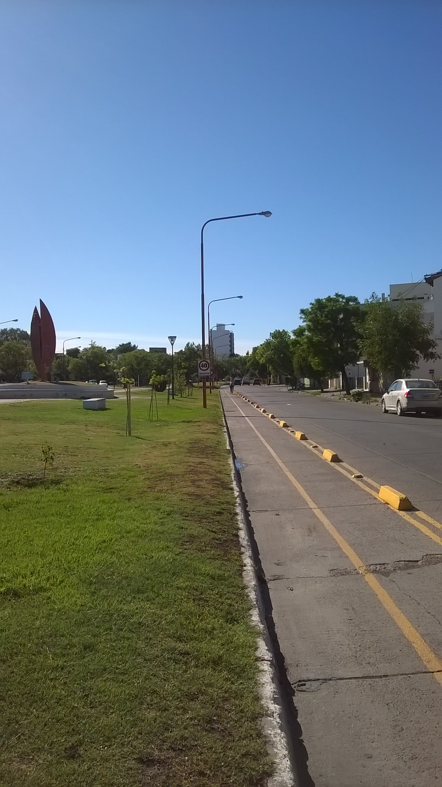 Ciclovía en Paso de las Esculturas